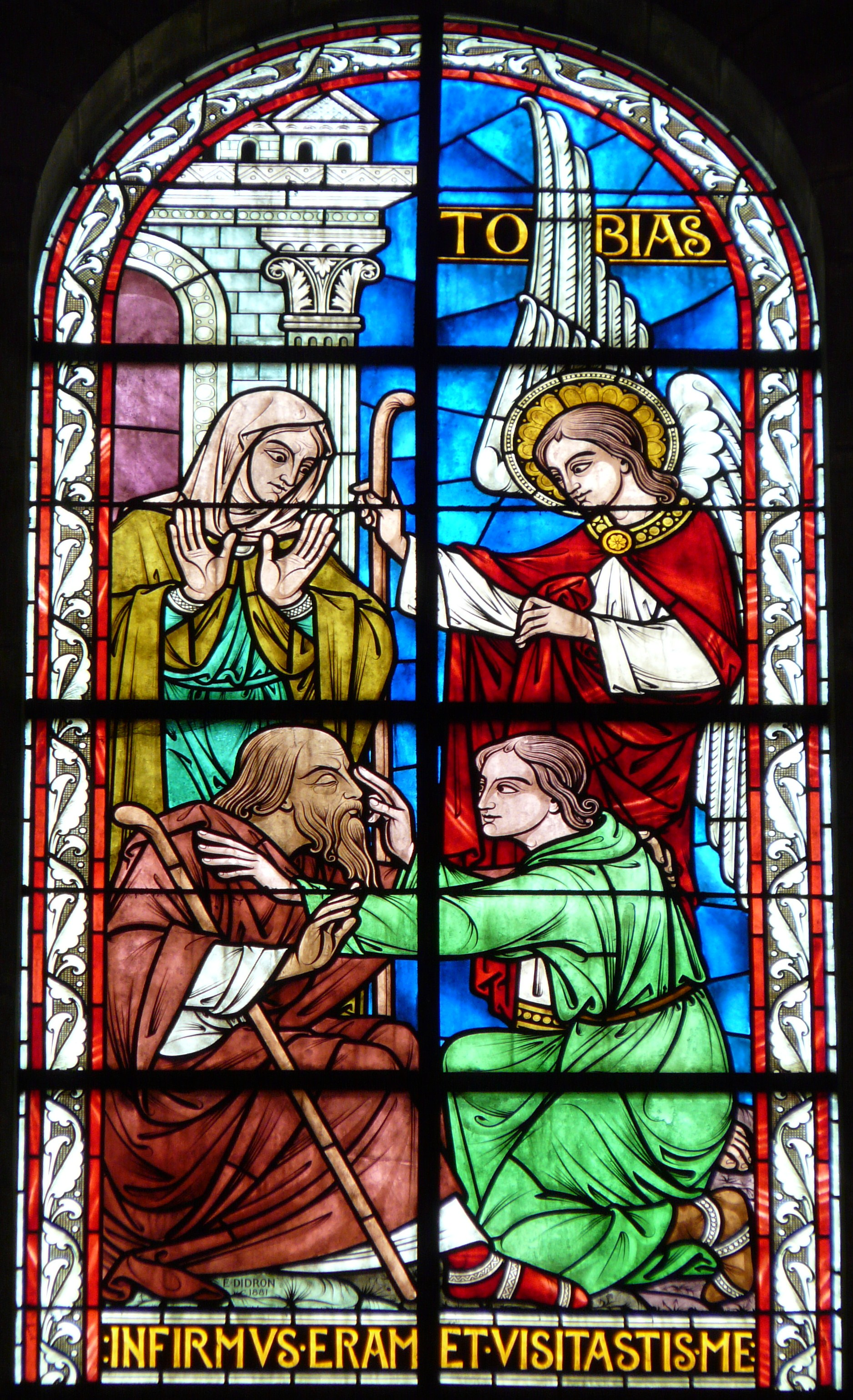 Vitrail représentant les Œuvres de miséricorde (Tobie rend la vue à son père, Tobit), mur nord de la cathédrale Saint-Front, Périgueux, Dordogne, France. Le vitrail, daté de 1881 est l'œuvre d'Édouard Didron.